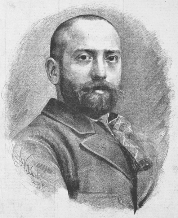 Portréty osobností od Jana Vilímka